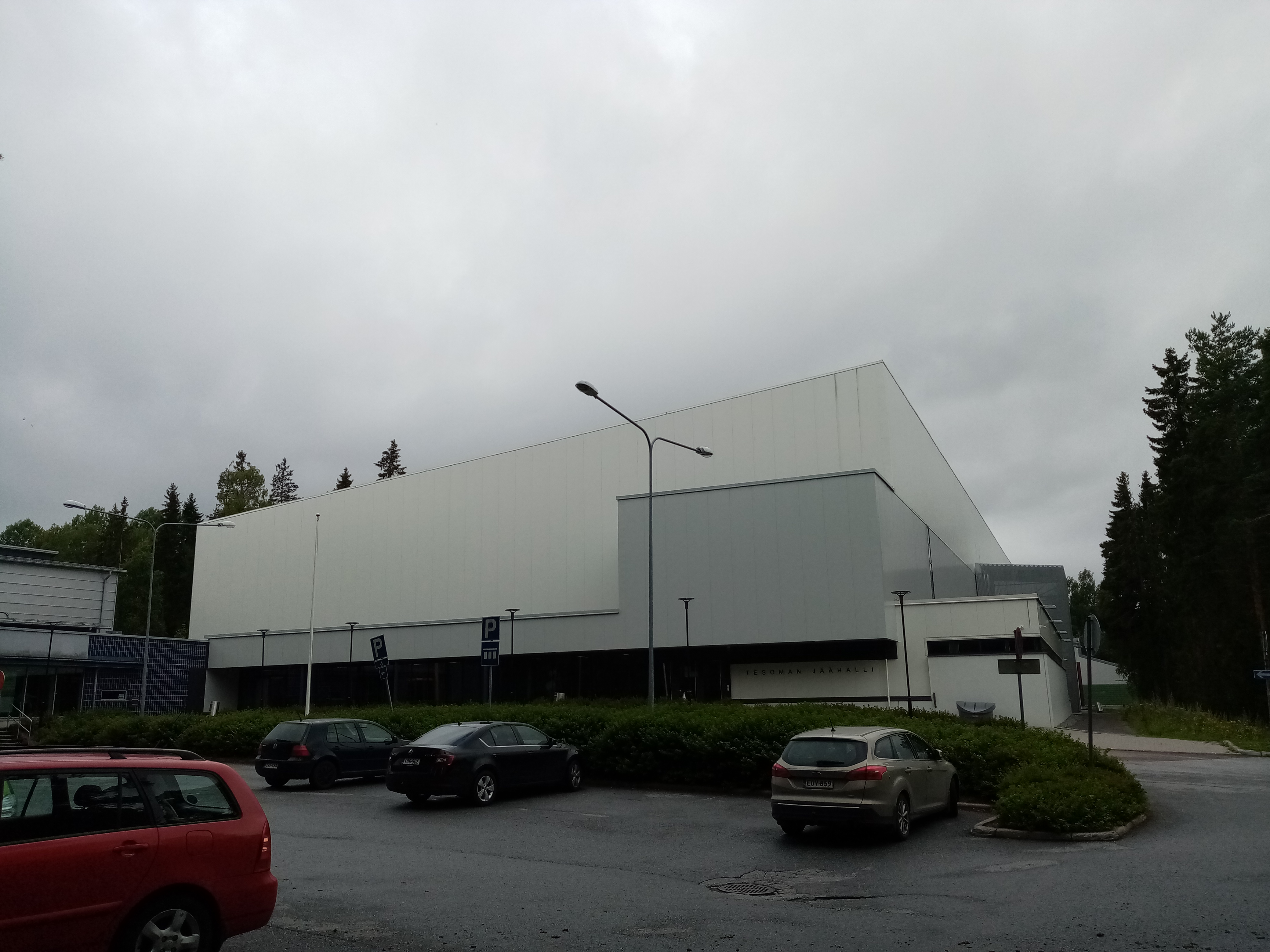 Vista do Tesoman jäähalli coa piscina de Tesoma á esquerda.